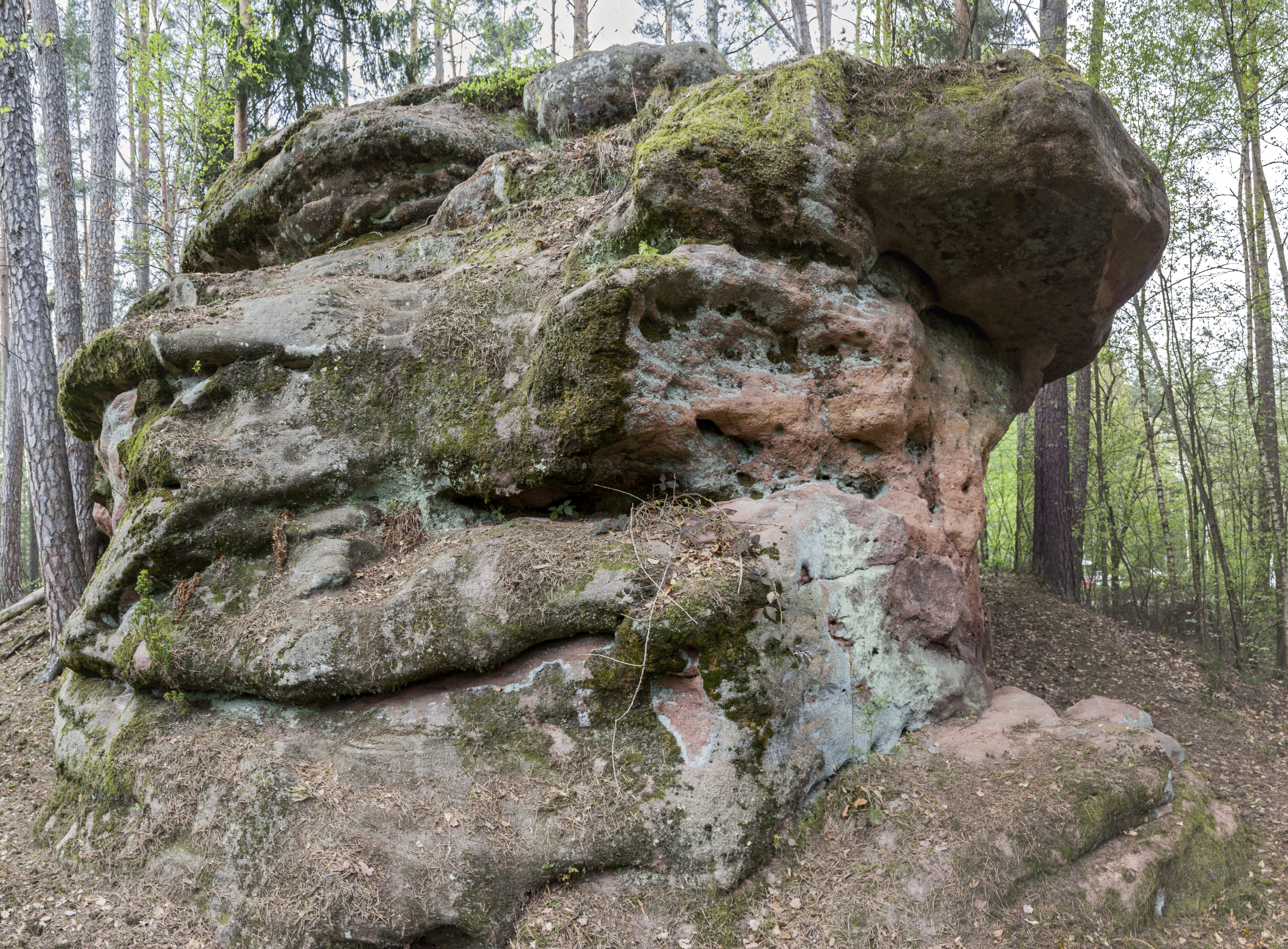 Burgsandsteinfelsen, Rummelsberg, Schwarzenbruck, Geotop